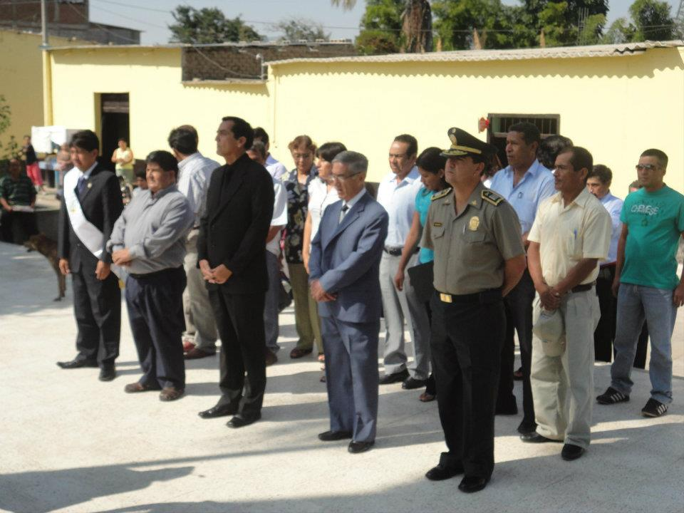 autoridades sanjosefanas